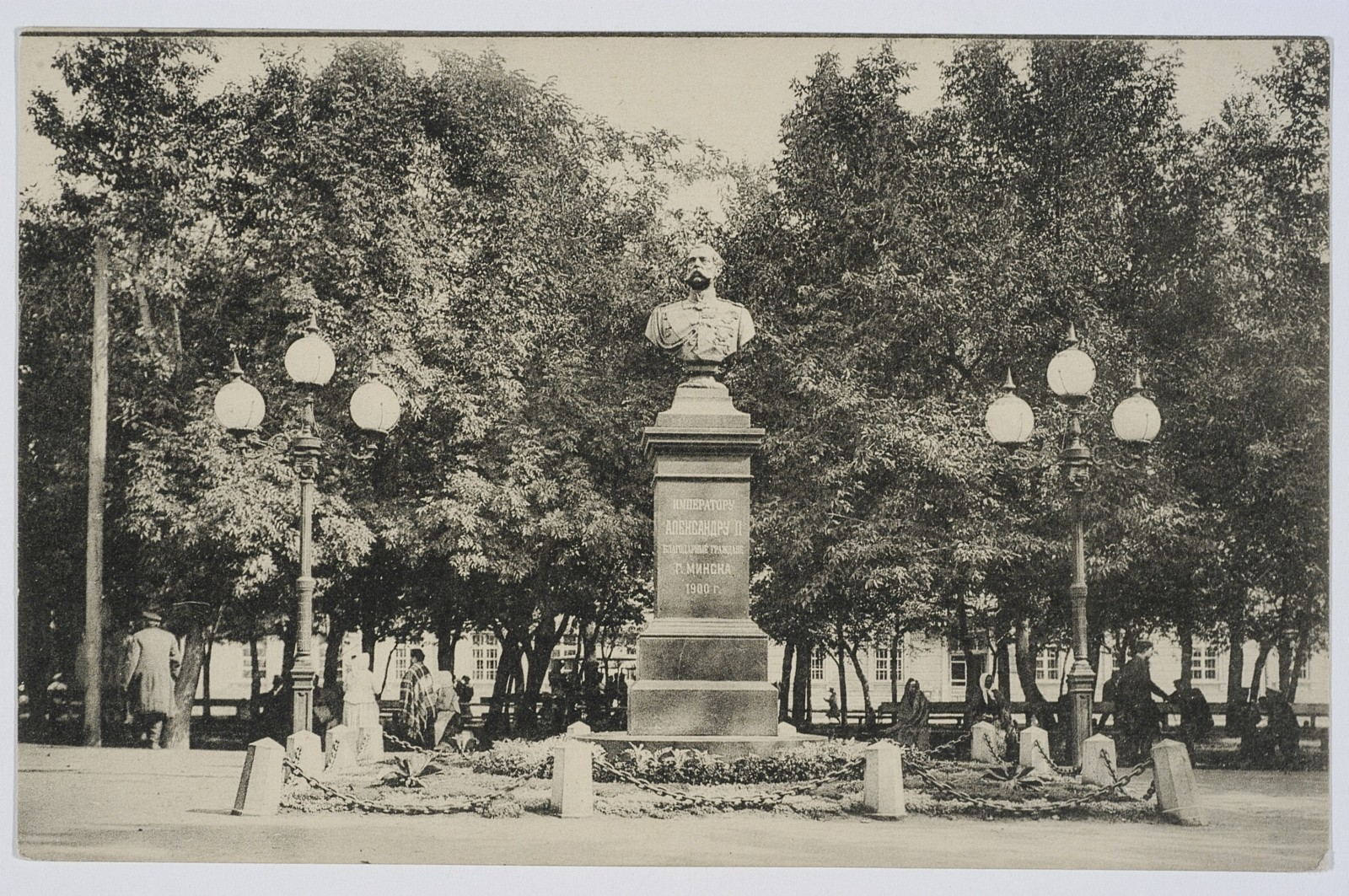 памятник императору Александру II